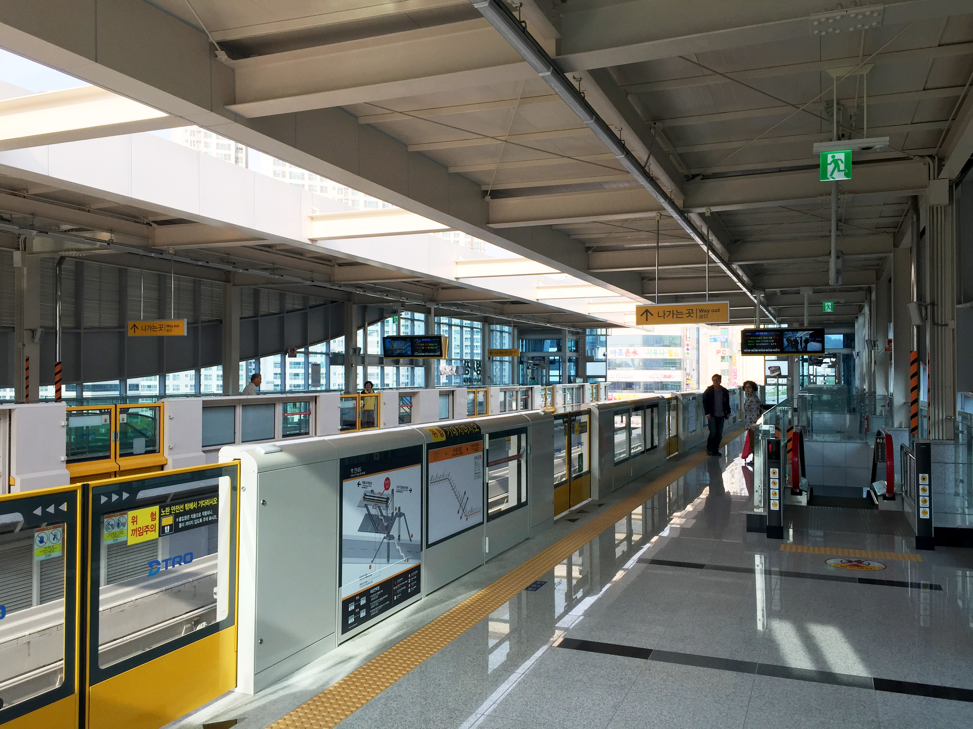 수성시장역 승강장